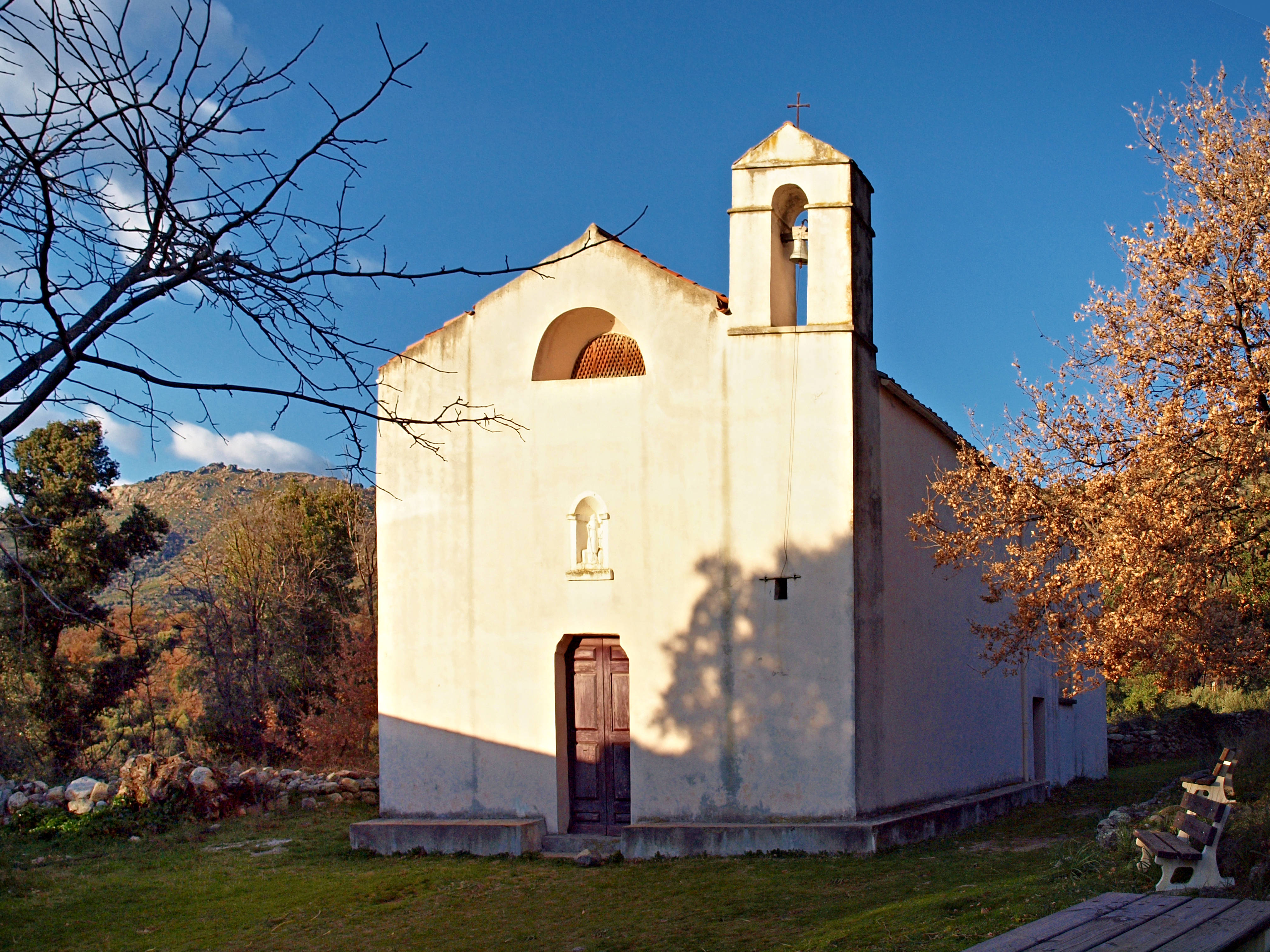 Zilia, Balagne (Corse) - Chapelle Saint-François